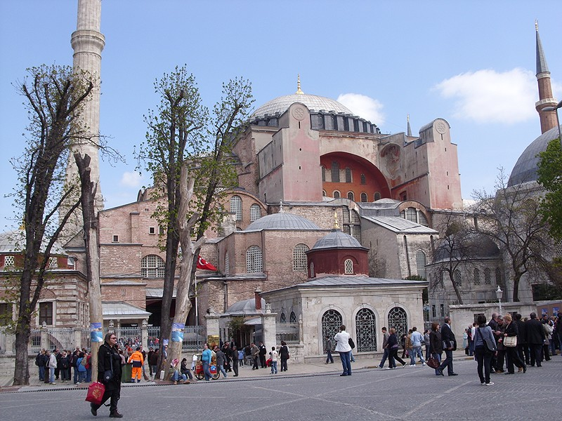 Istanbul - Basilica di S. Sofia